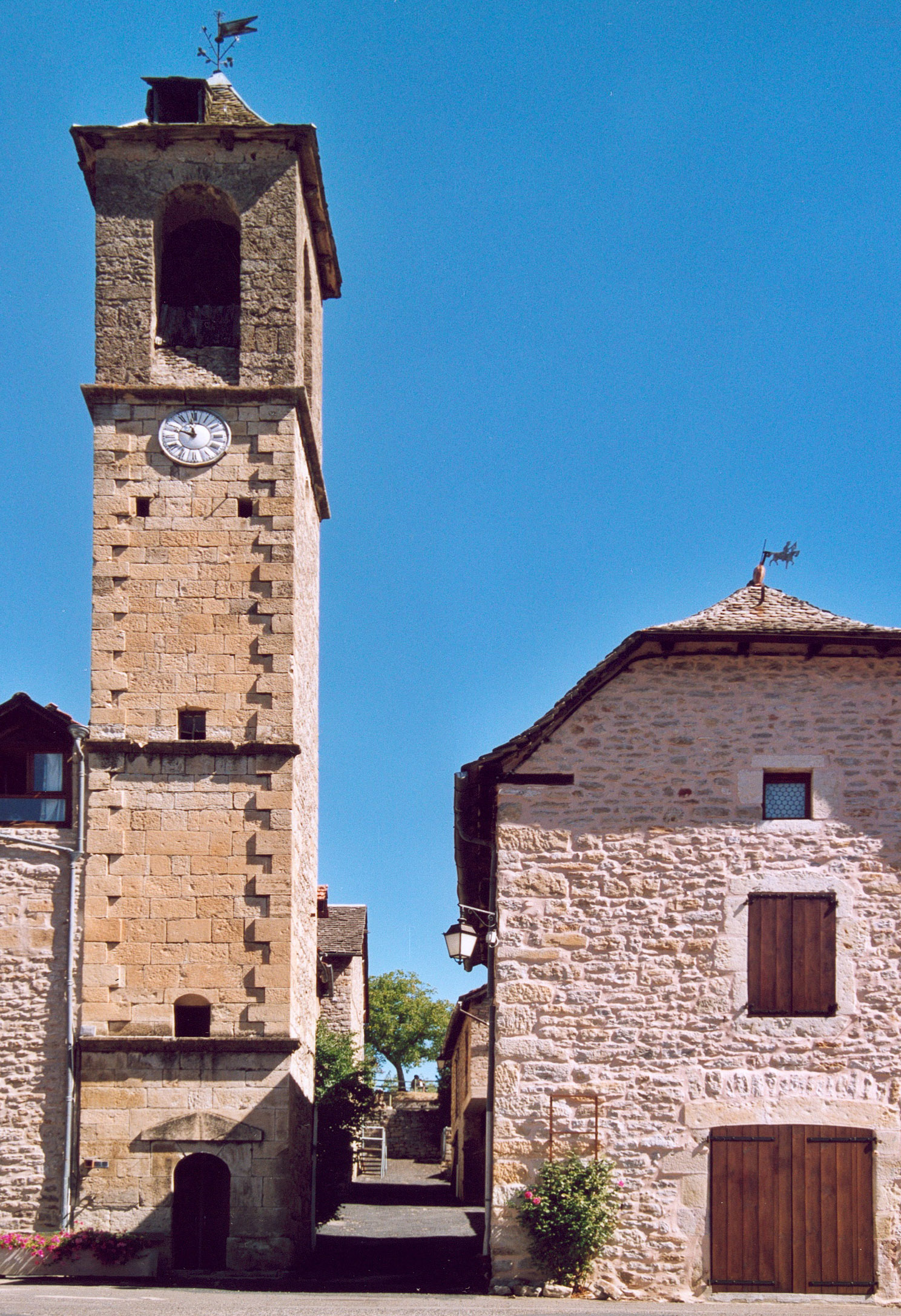 France Lozère Chanac Photographie prise par GIRAUD Patrick Août 2005